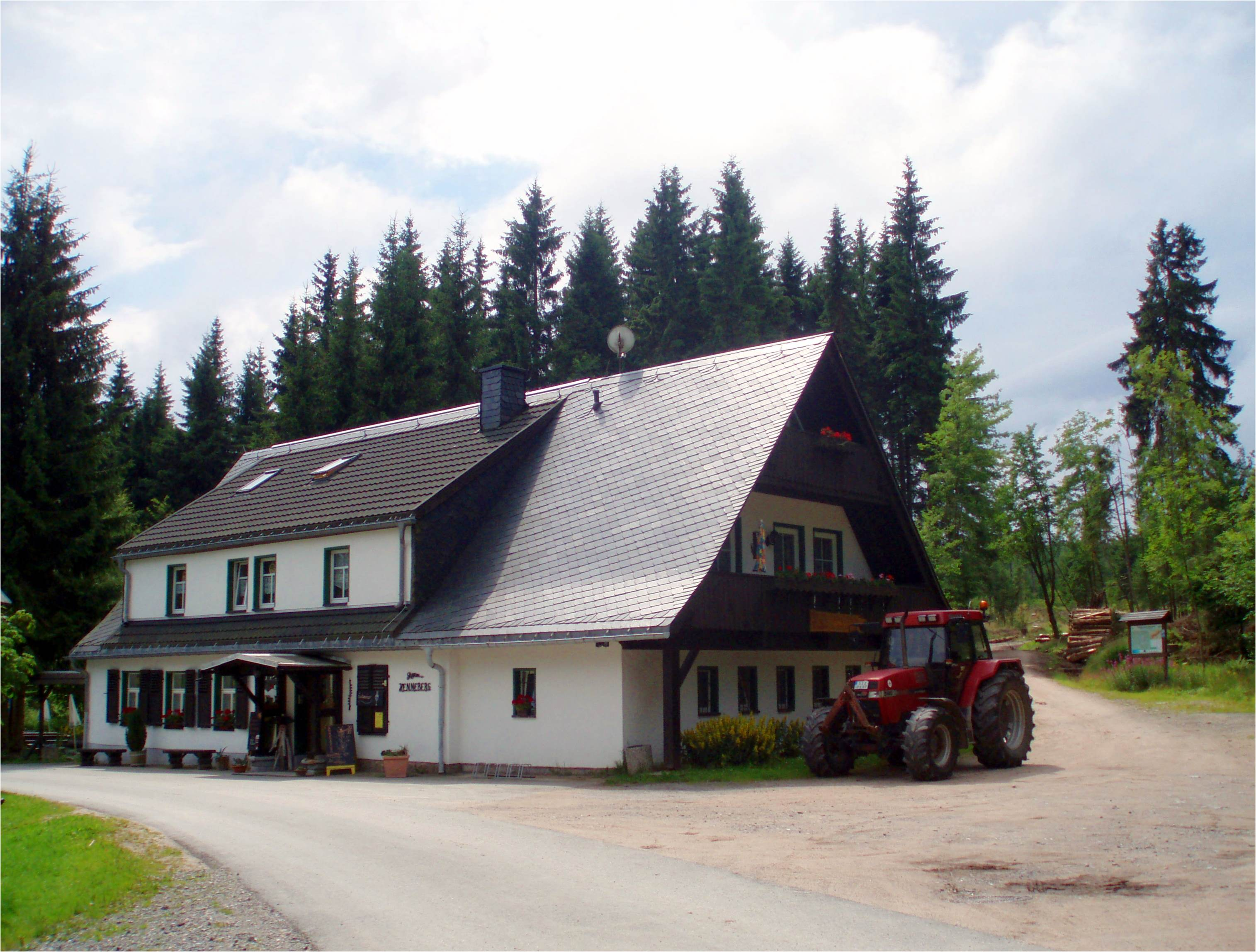 Gasthaus Henneberg